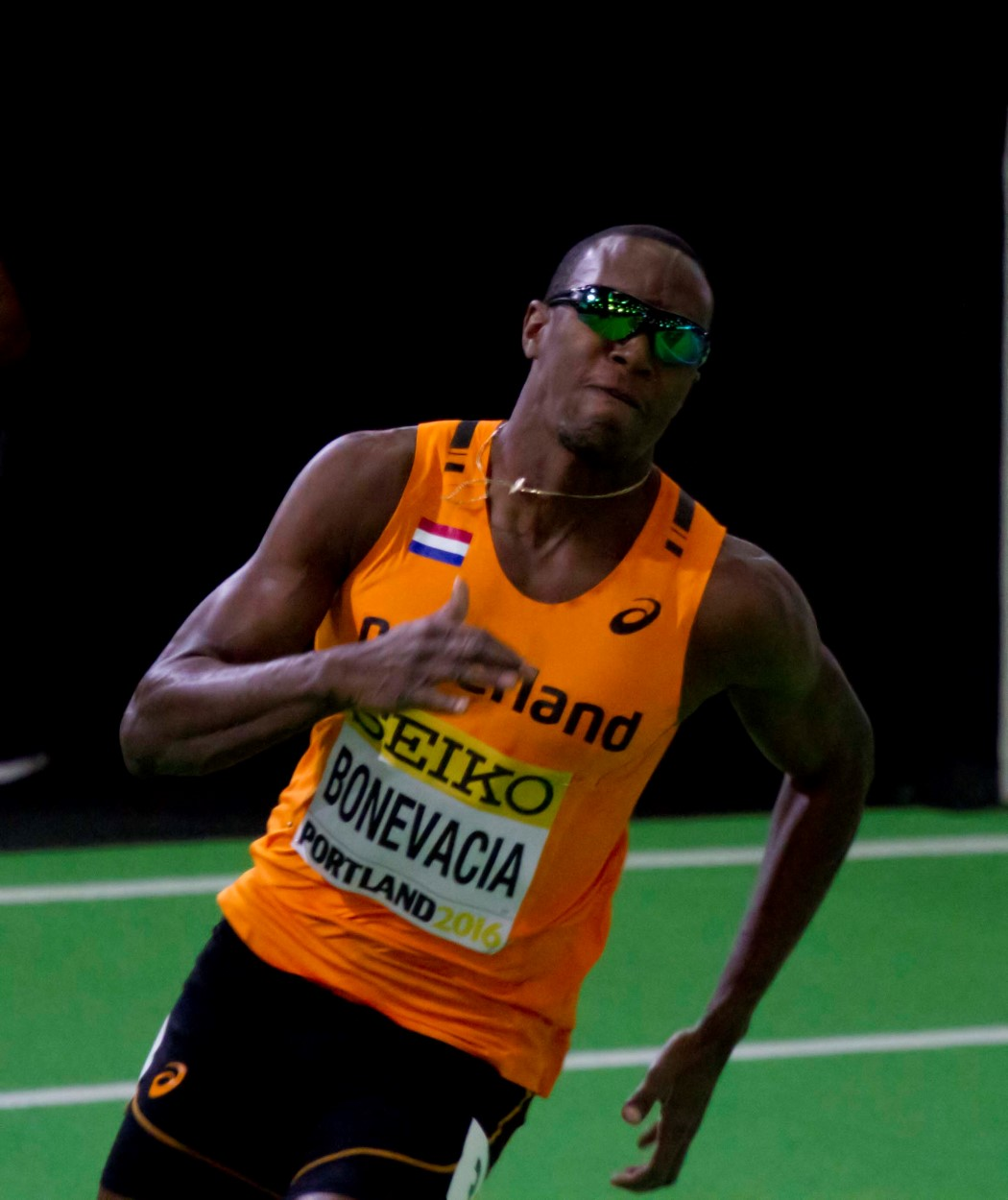 087 bonevacia